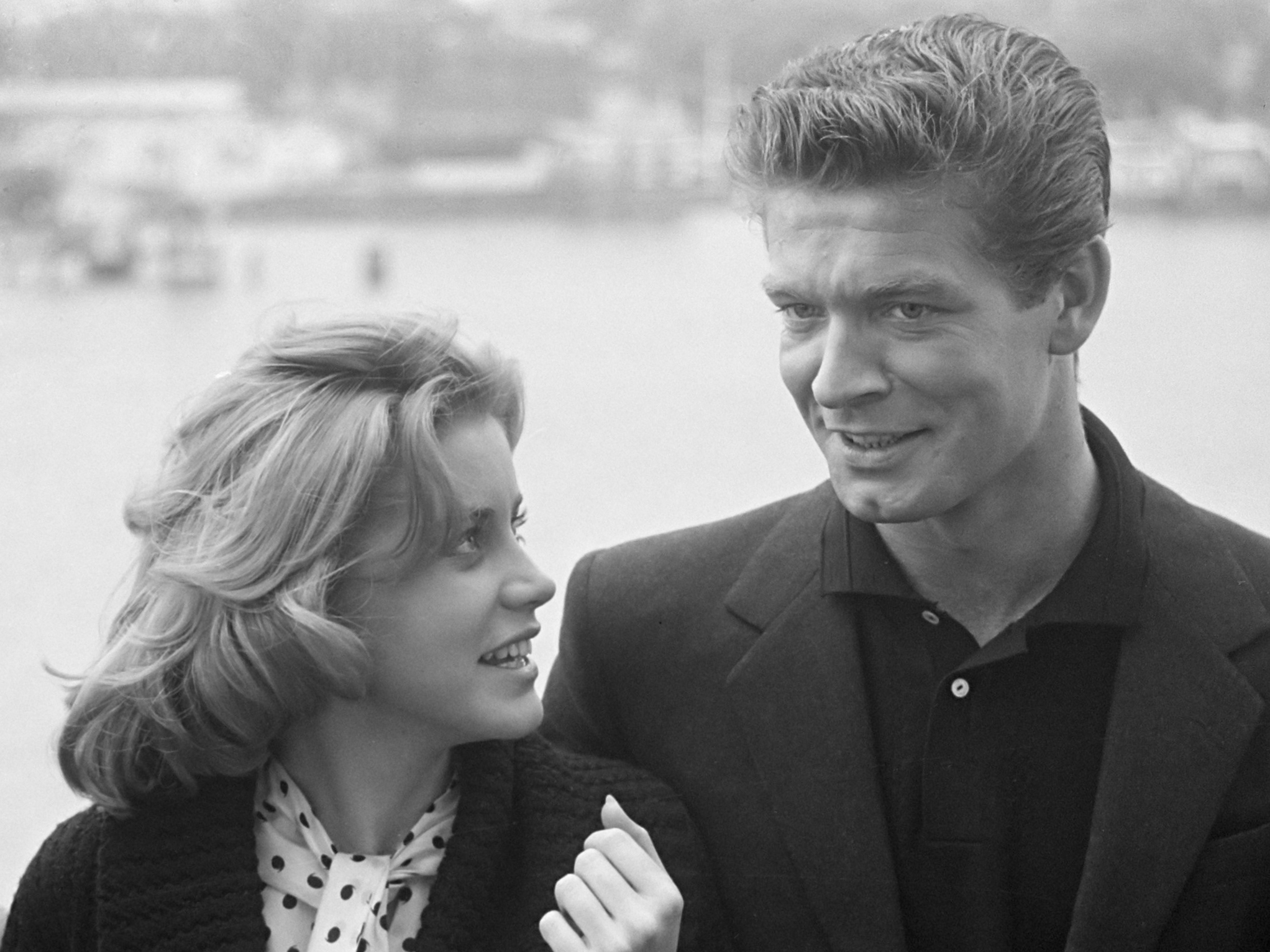 Cocktailparty Stephen Boyd en Dolores Hart . Philip Dun , Dolores Hart en Stephen Boyd 20 juni 1961